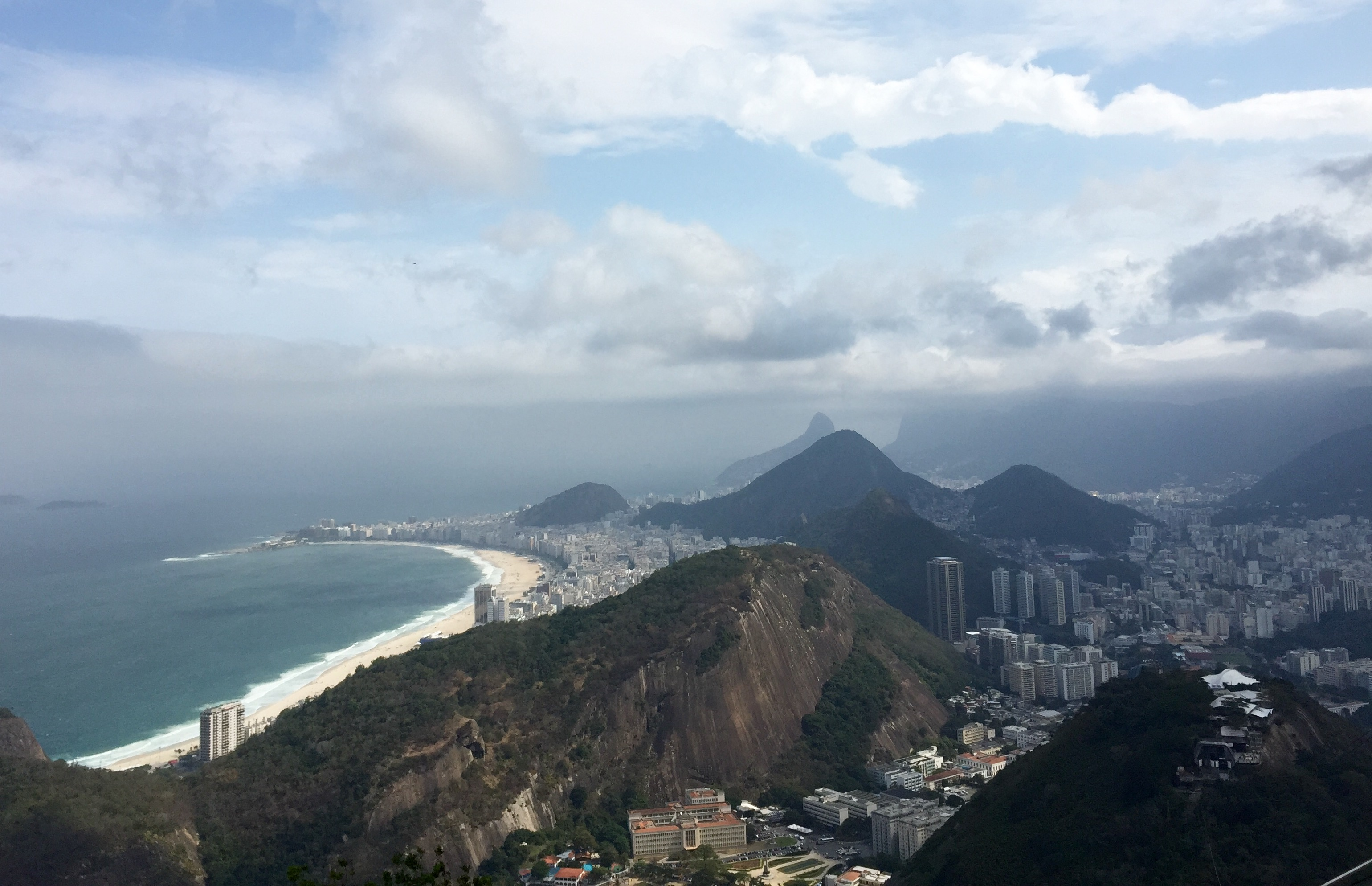 Praia de Copabana, no Rio de Janeiro.